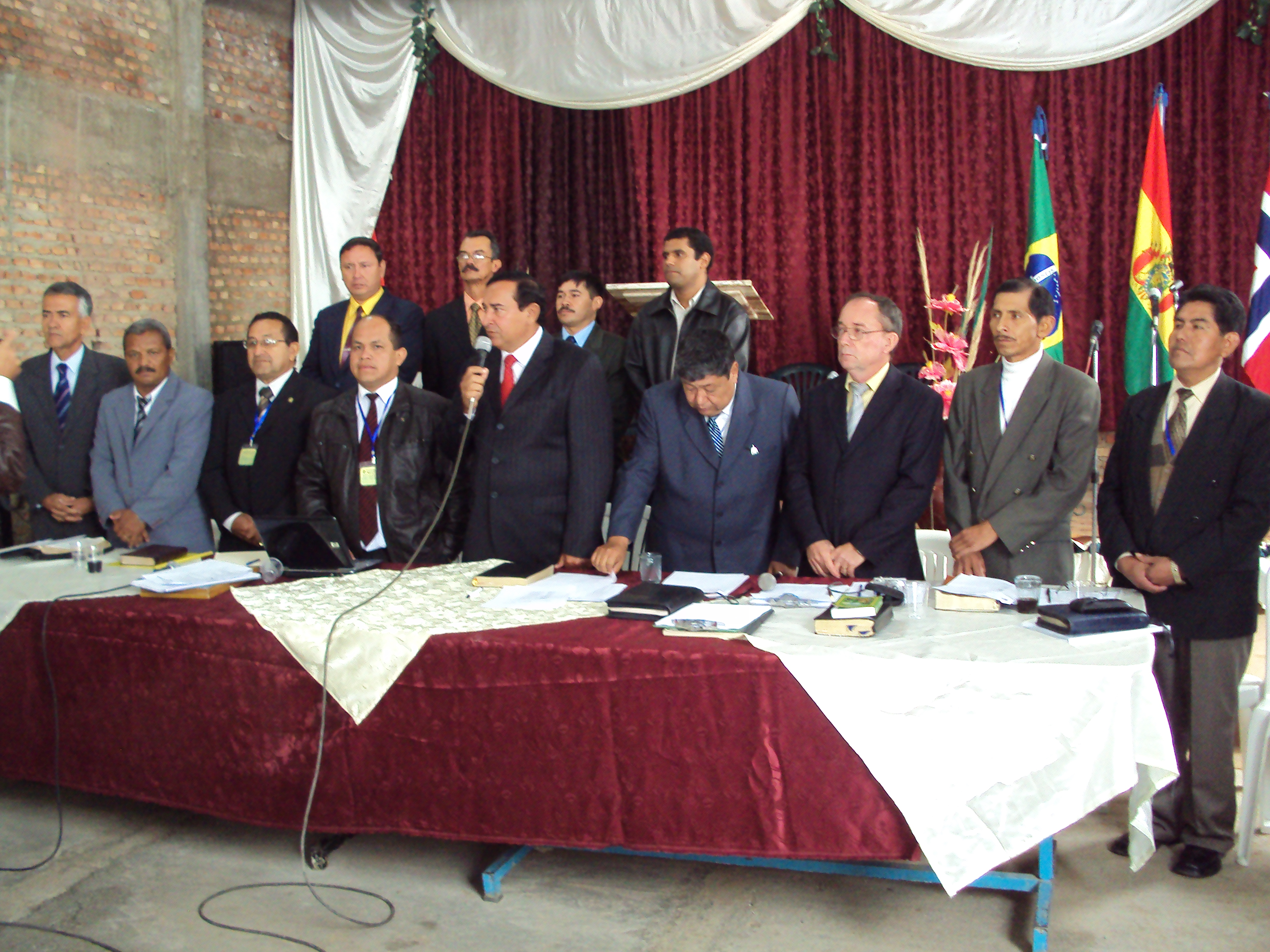 XIX Convenção da CONAEM, Brasil